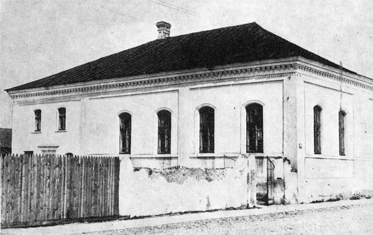 Беларуская (тарашкевіца): Стоўпцы (Stoŭpcy), Вялікая сынагога